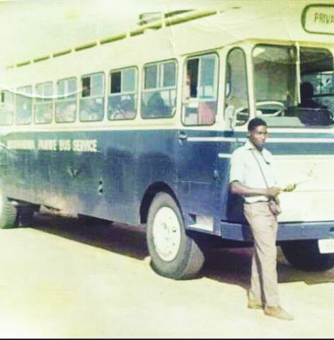 Mushandira Pamwe Buses